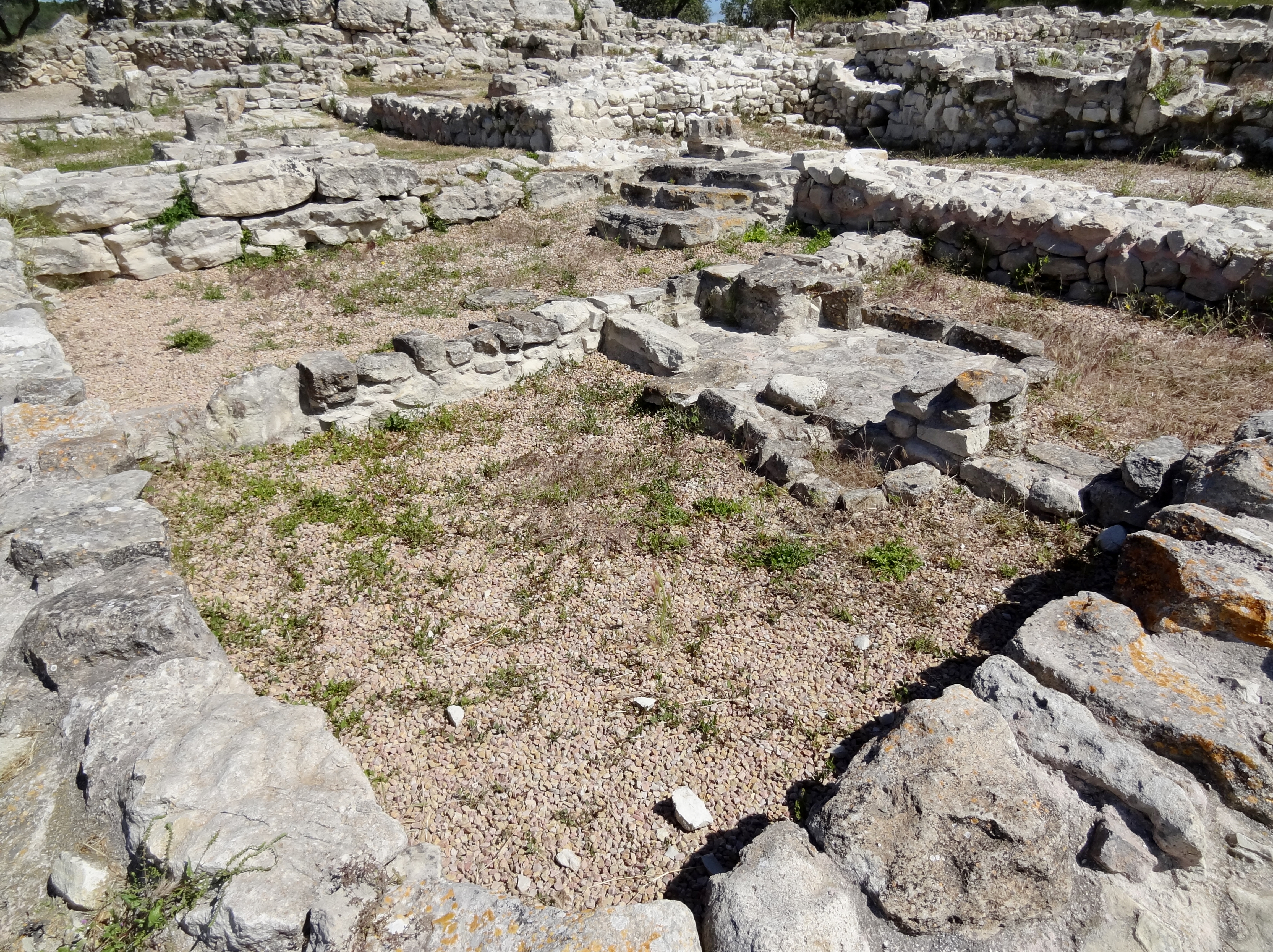 Talaiotisches Haus 5 der Ausgrabungsstätte von Son Fornés, Gemeinde Montuïri, Mallorca, Spanien